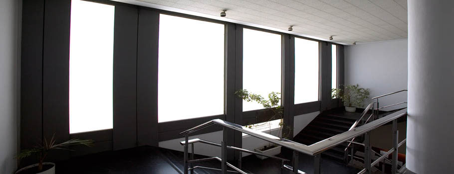 Escaleras del Conservatorio Superior de Música Eduardo Martínez Torner. Oviedo. España